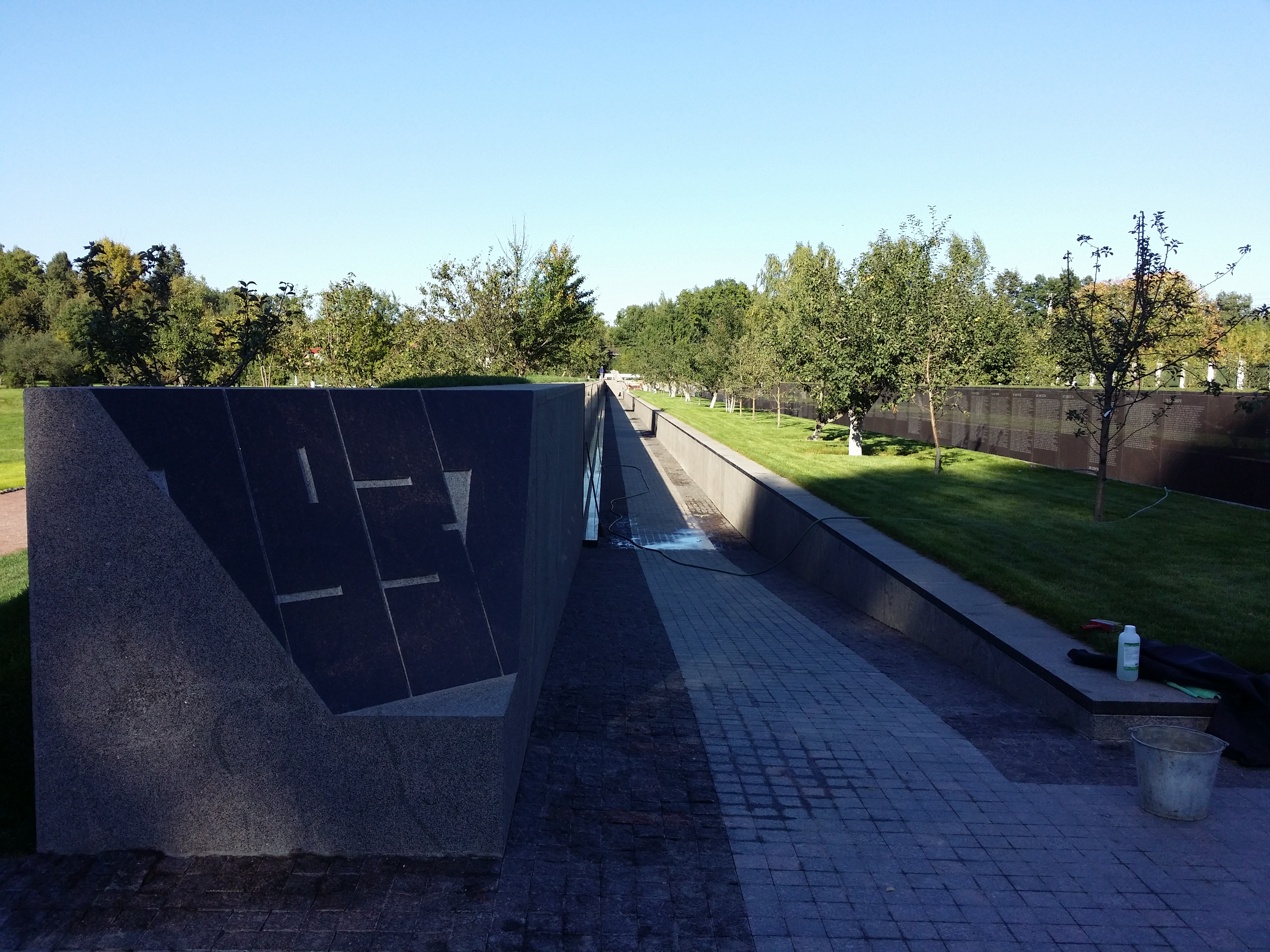 Бутовский полигон: Юбилейная улица, Дрожжино, Ленинский район, Московская область